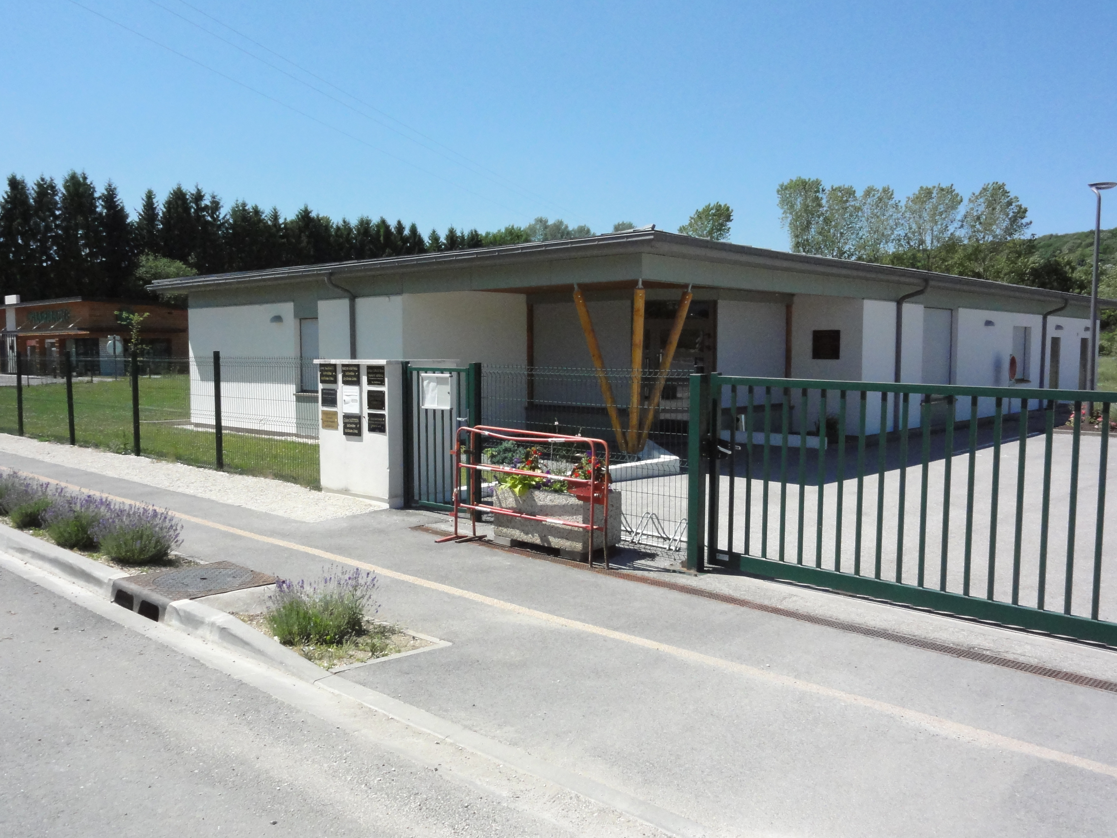 Doulaincourt, Pôle Médical et pharmacie, rue Général Philippe Leclerc